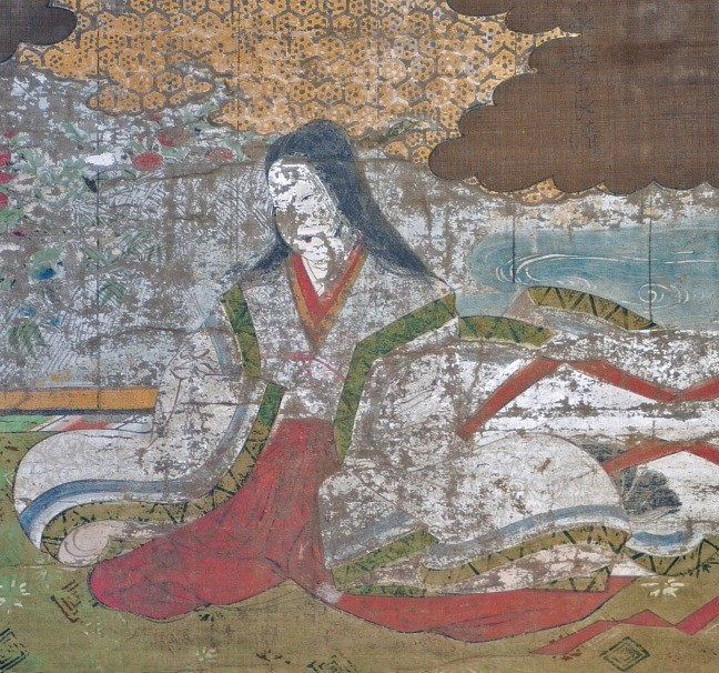 立花誾千代の肖像。